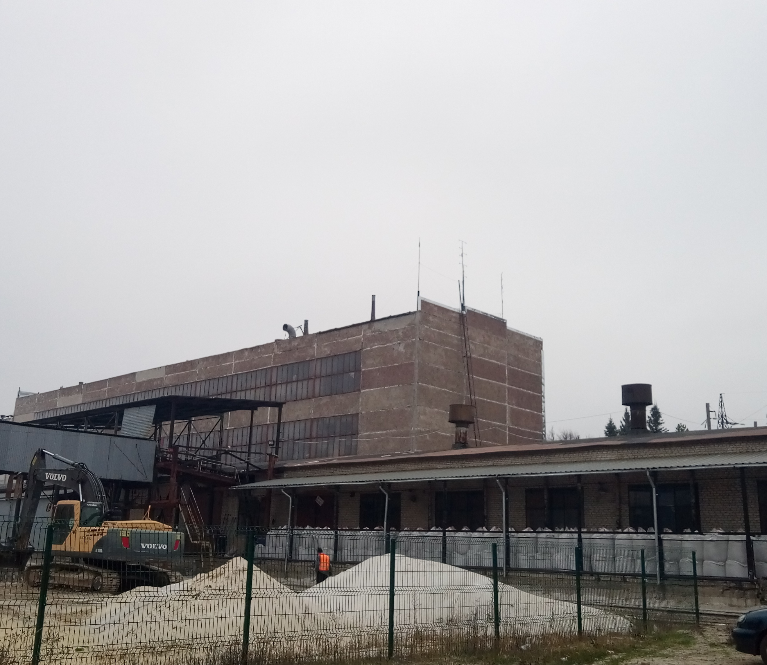 Вид збоку на збагачувальну фабрику Новоселівського гірничо-збагачувального комбінату